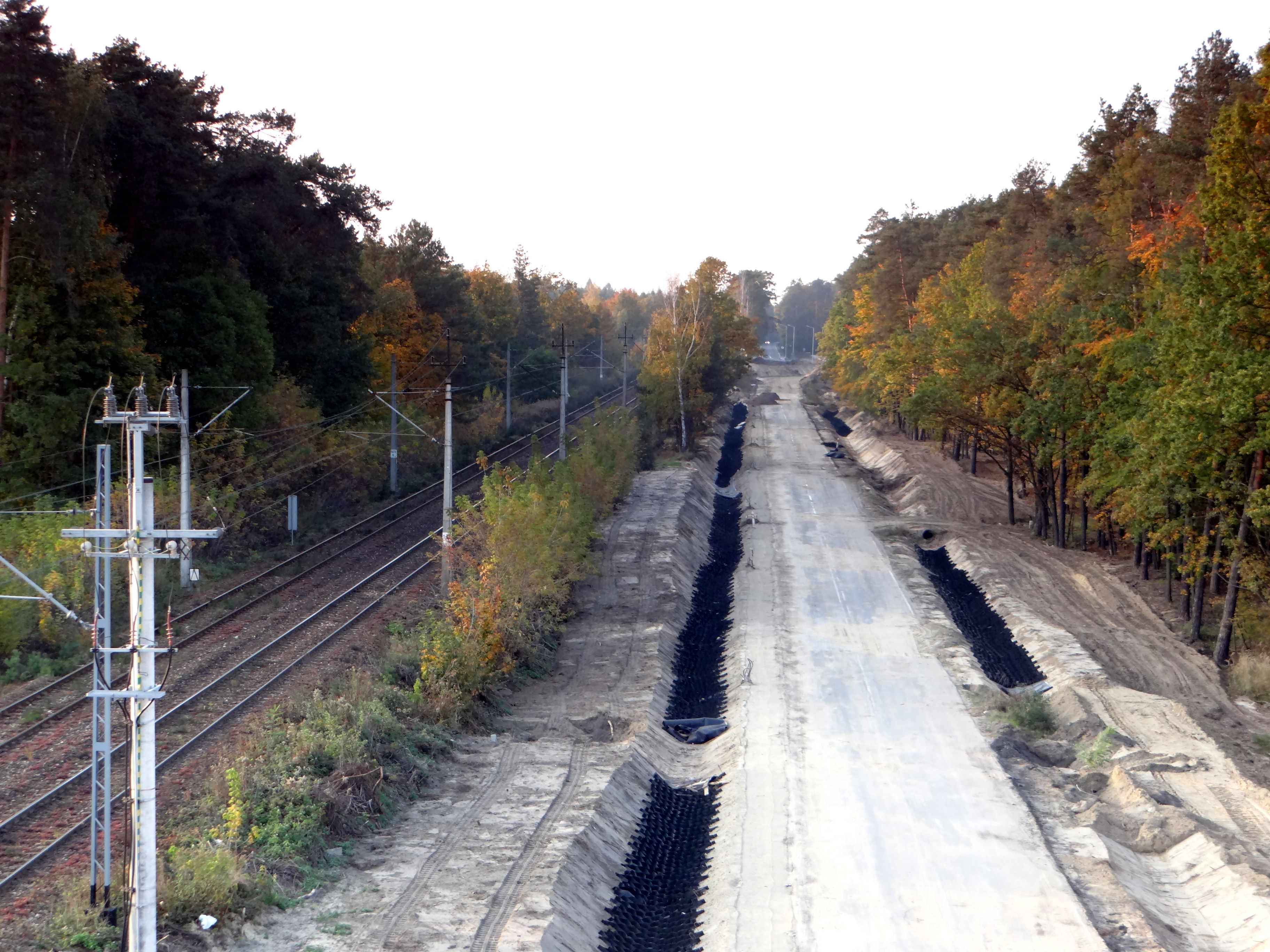 Staveniště obchvatu města Leżajsk, Polsko